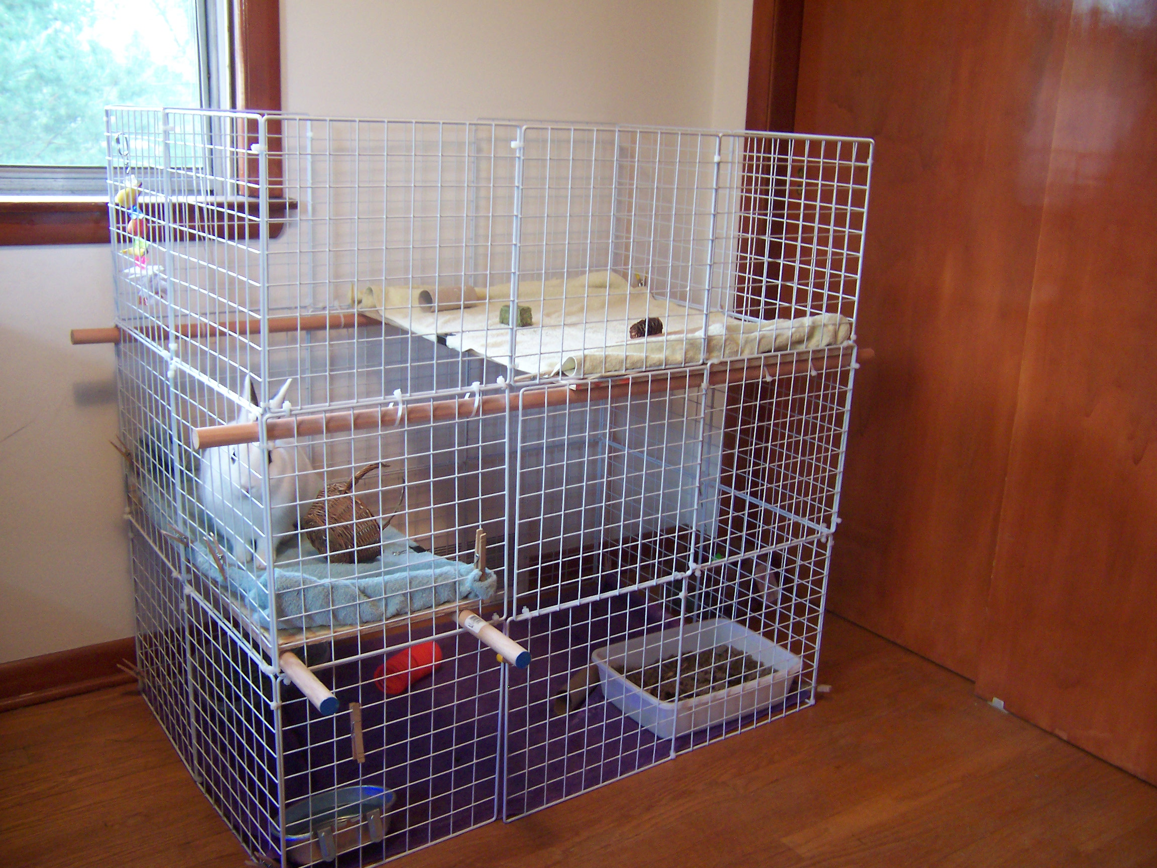 Multi-level condo (cage) for house rabbit